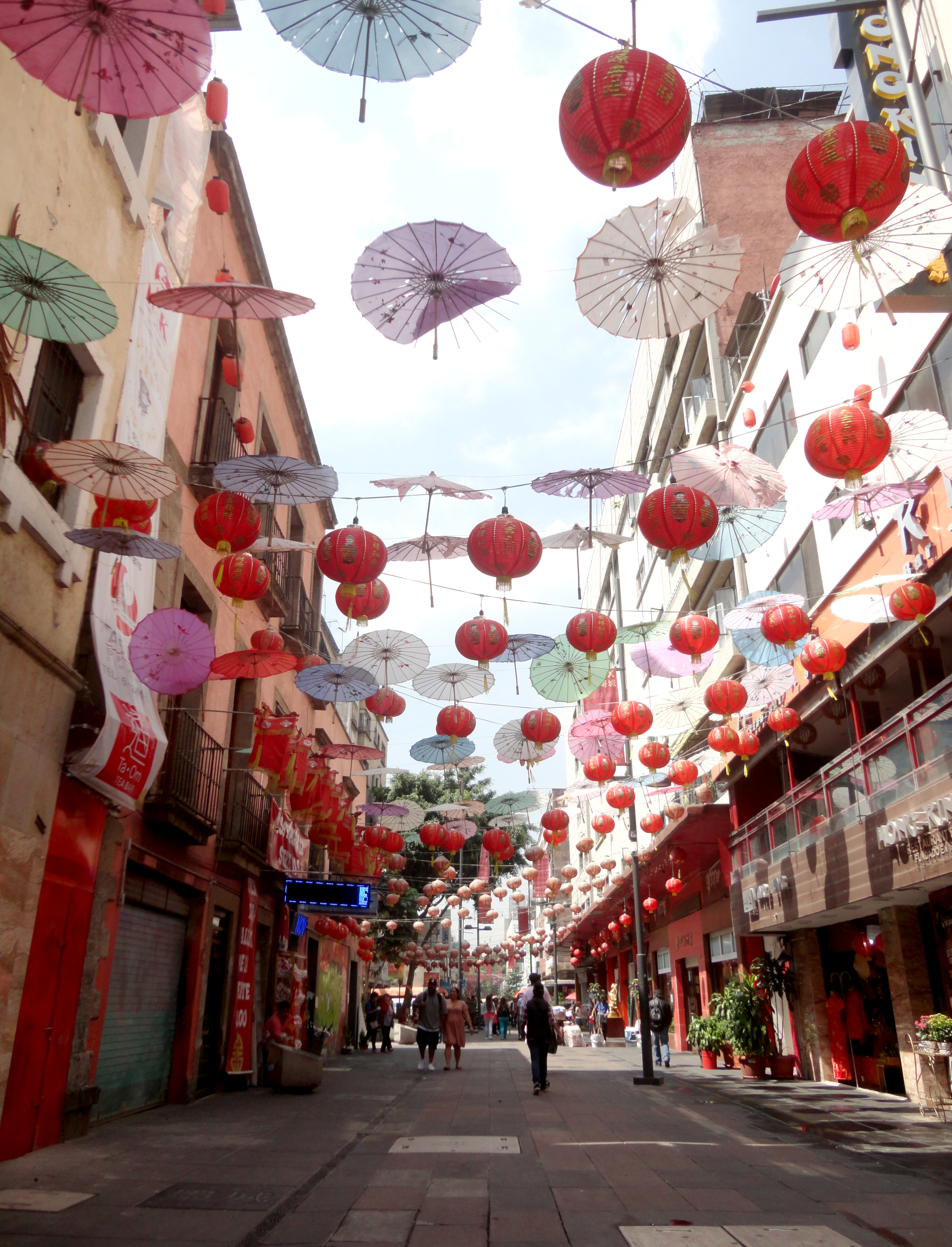 Barrio Chino, Ciudad de México